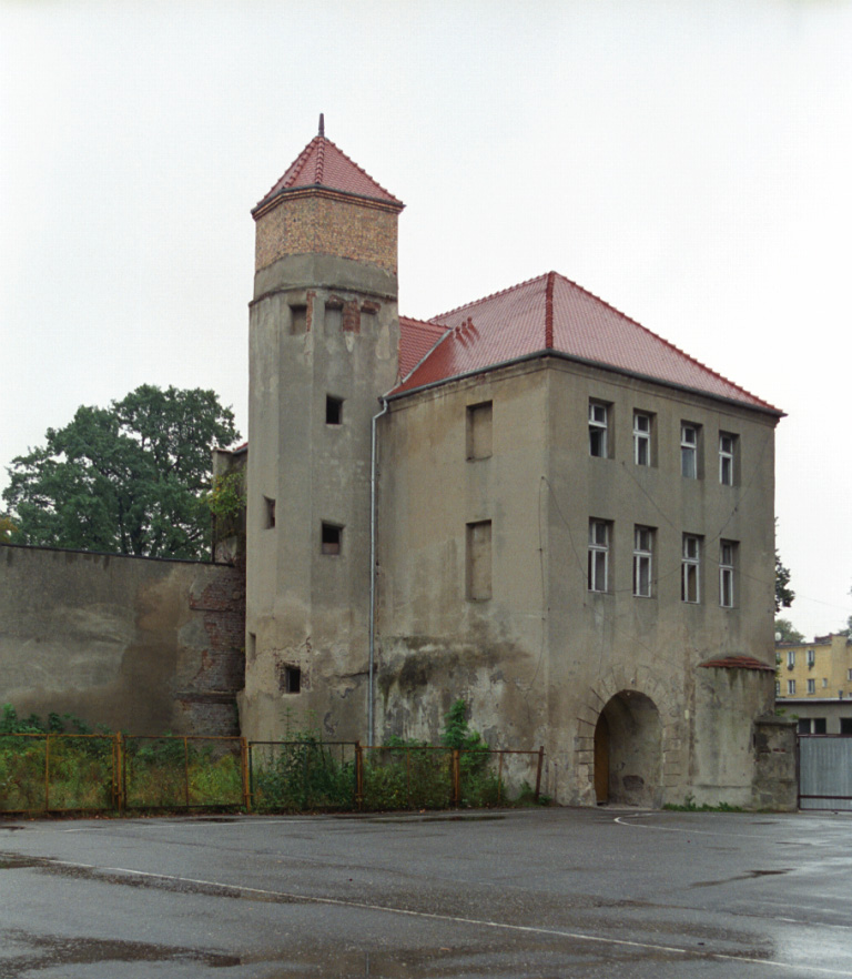 Krosno Odrzańskie, zamek, budynek bramny